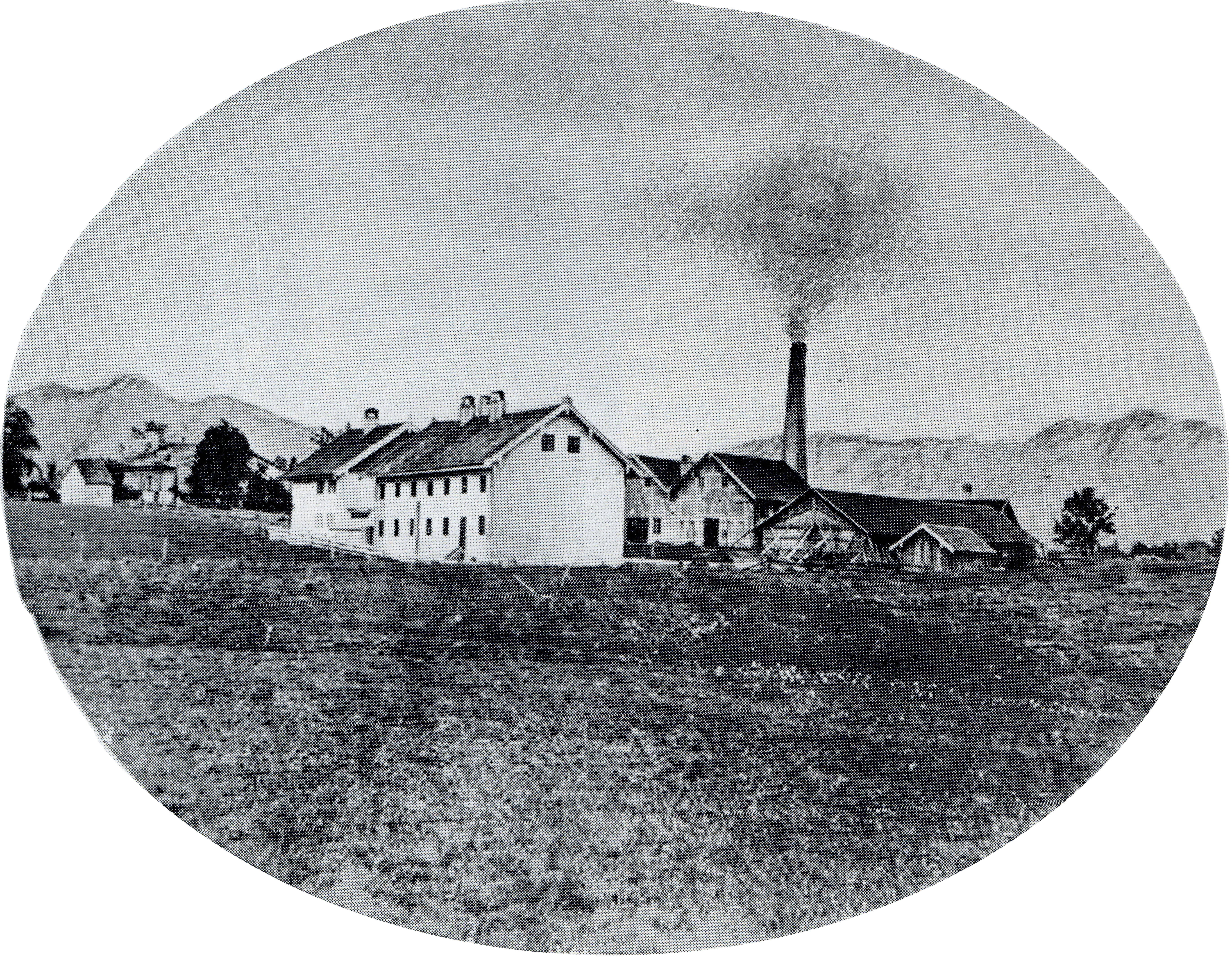 Die Schachtanlagen des Bergwerks Penzberg um 1860 (Isabellenschacht)